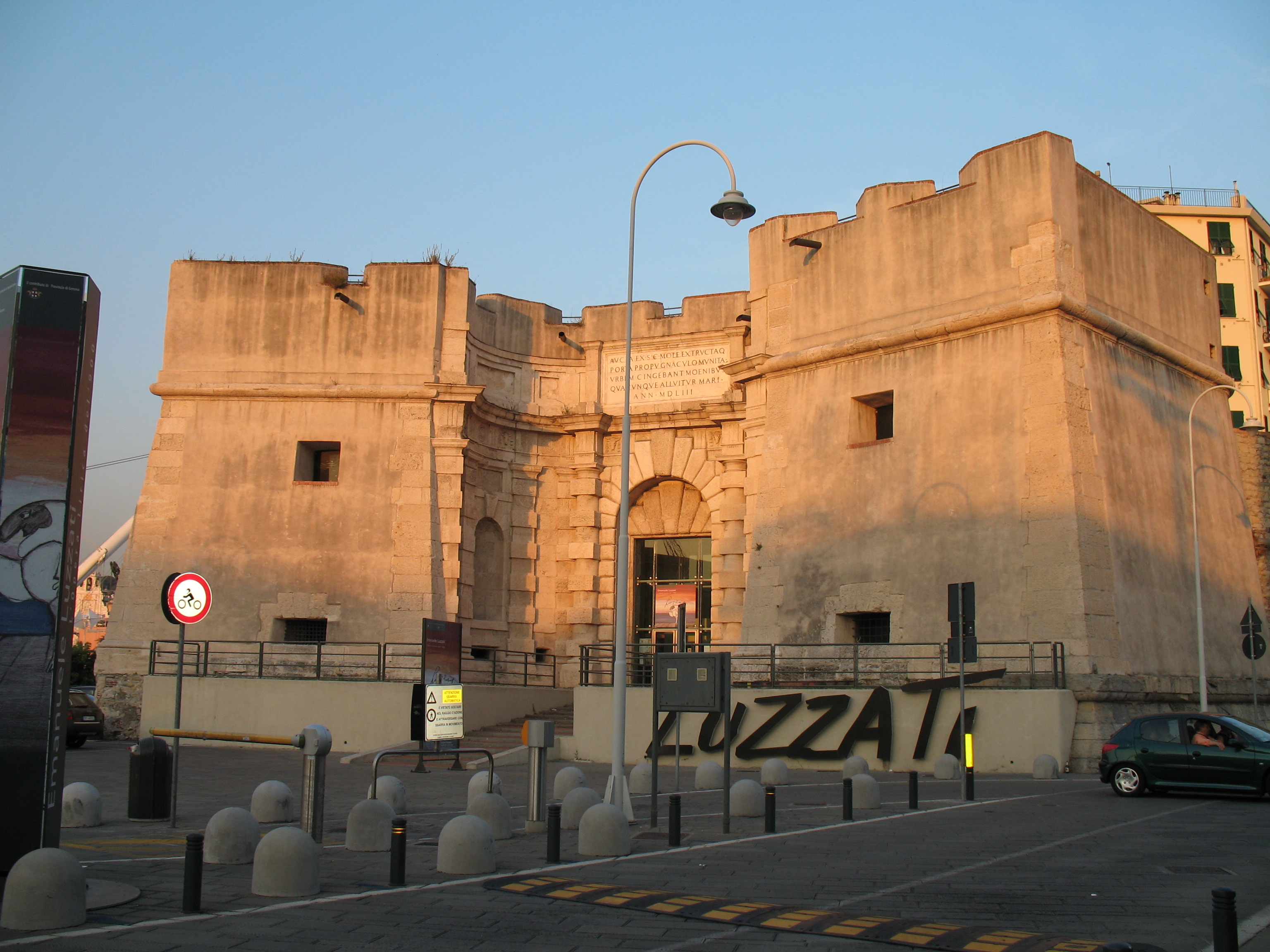 Genova - porto antico Varco di Porta Siberia e Museo Luzzati, porto antico